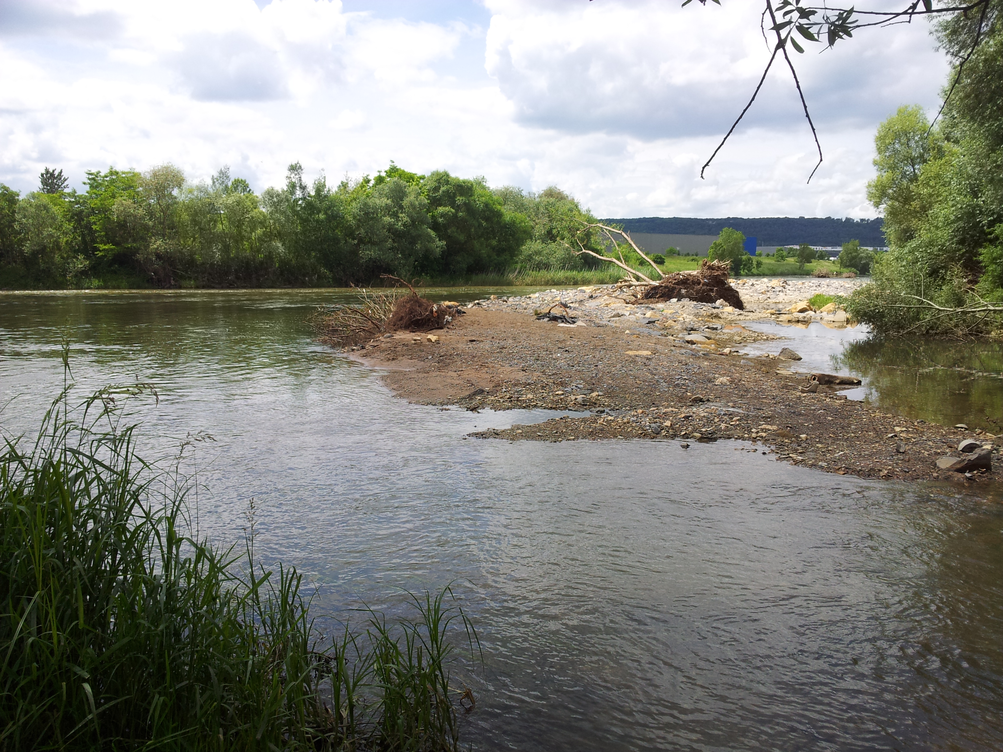 Confluent de l'Amezule et de la Meurthe près du lieu-dit Le Moulin Noir, sur la commune de Lay-Saint-Christophe. Le banc de sable à droite sur lequel reposent des souches d'arbres s'est formé suite à la crue de la nuit du 21 au 22 mai 2012.